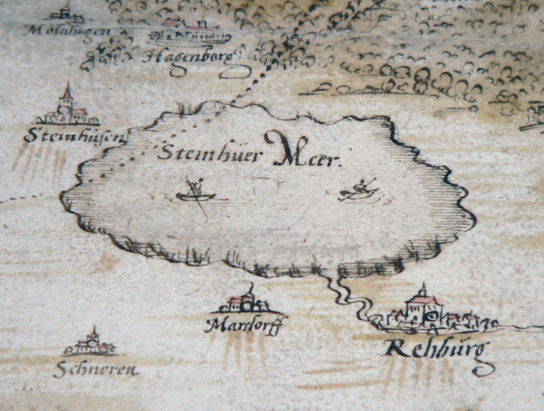 Steinhuder Meer in Stiftsfehde, Norden ist auf der Unterseite des Bildes